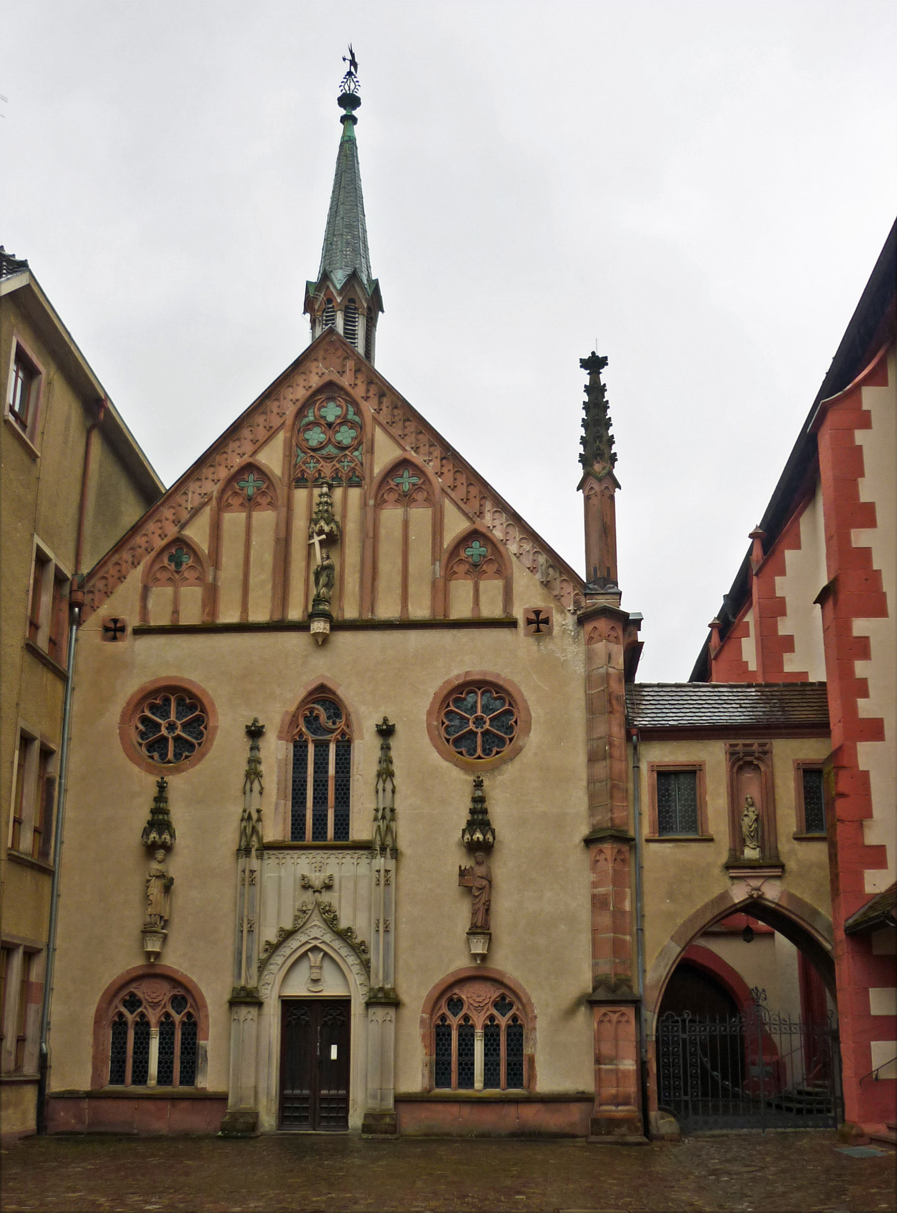 Fürstenkapelle im Kloster Lichtenthal in Baden-Baden